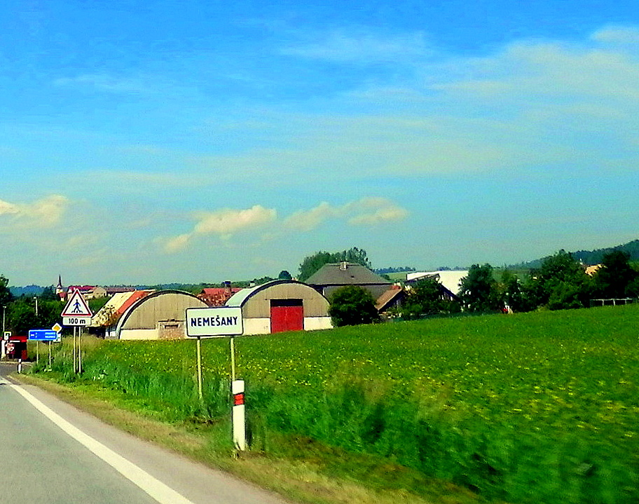 Obec Nemešany zo smeru od Prešova. Okres Levoča